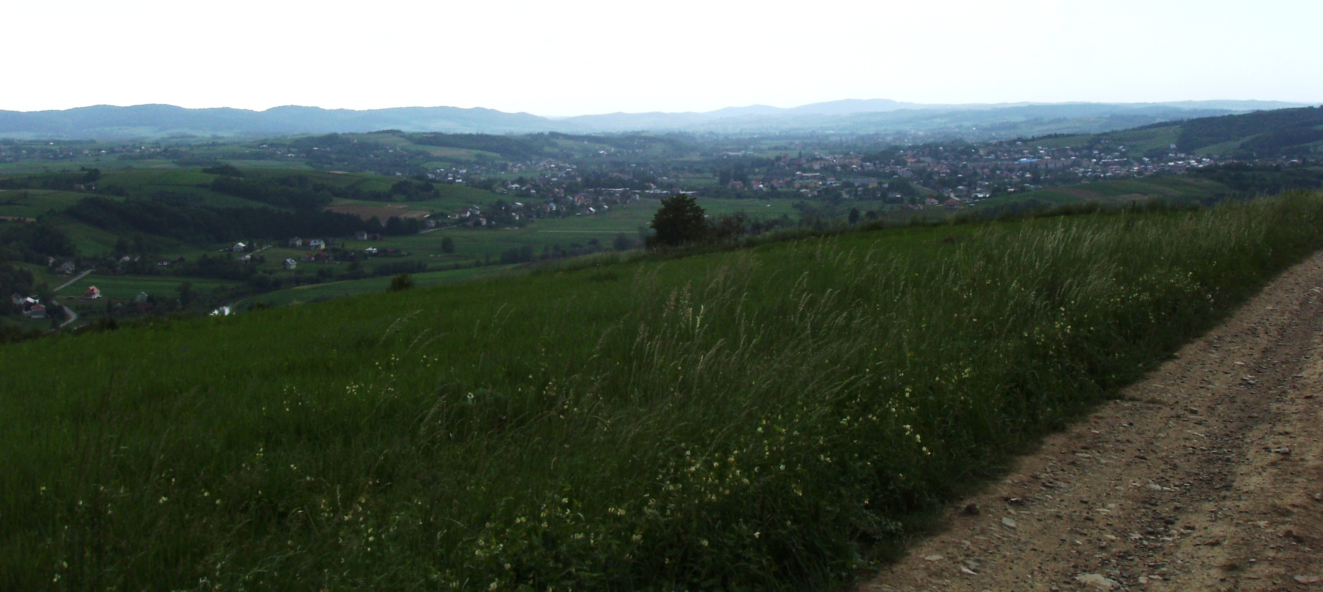 Strzyzów